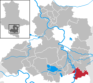 Bad Dürrenberg in Saxony-Anhalt - Saalekreis